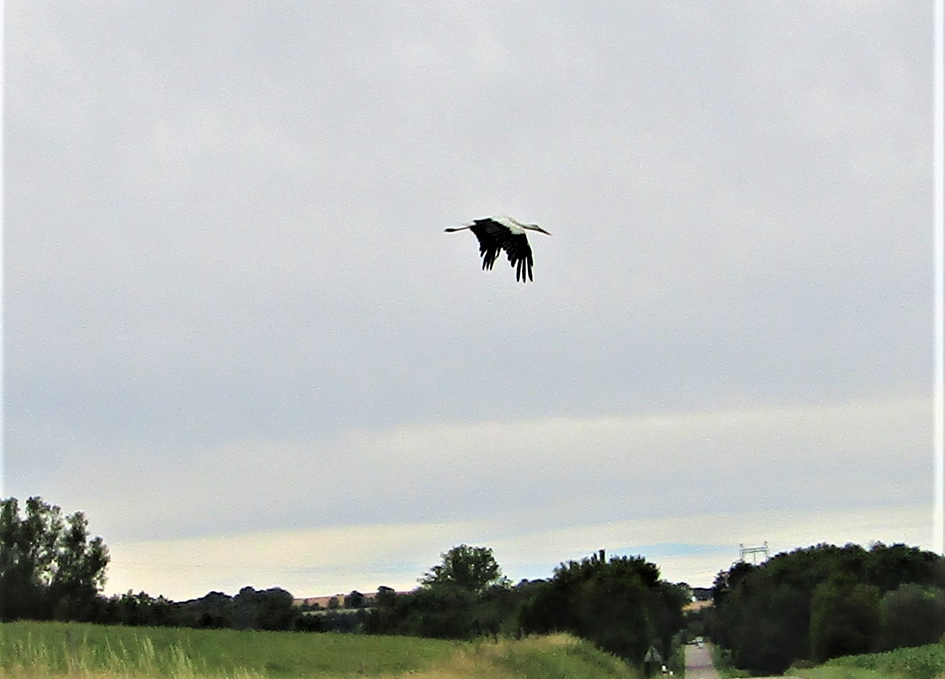 Cigogne dans le ciel de Doissin